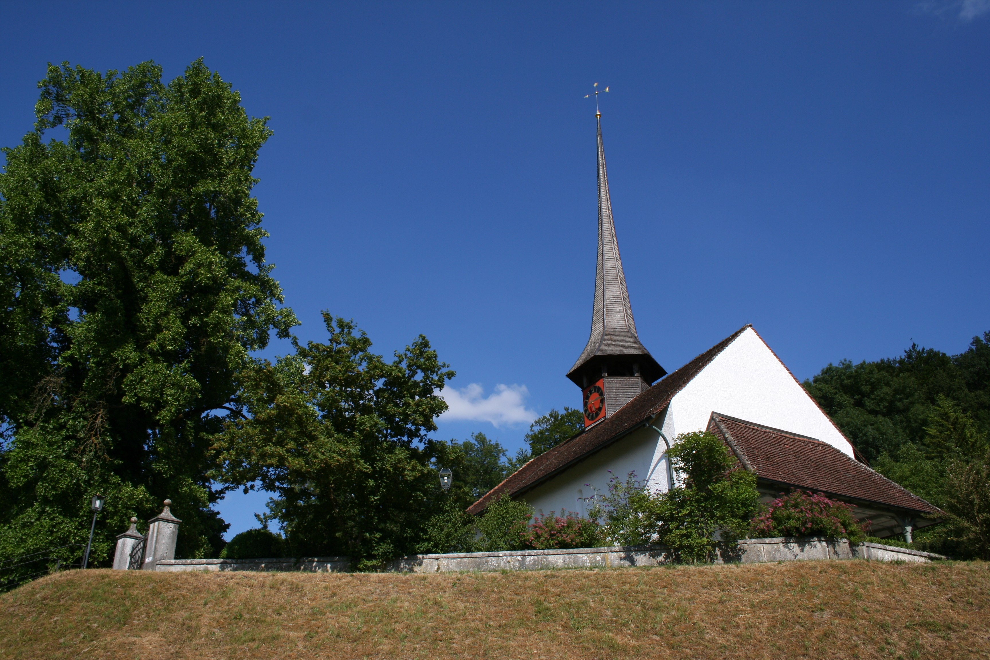 reformierte Kirche Arch, Schweiz. Im Hof der Kirche befindet sich auch der Friedhof